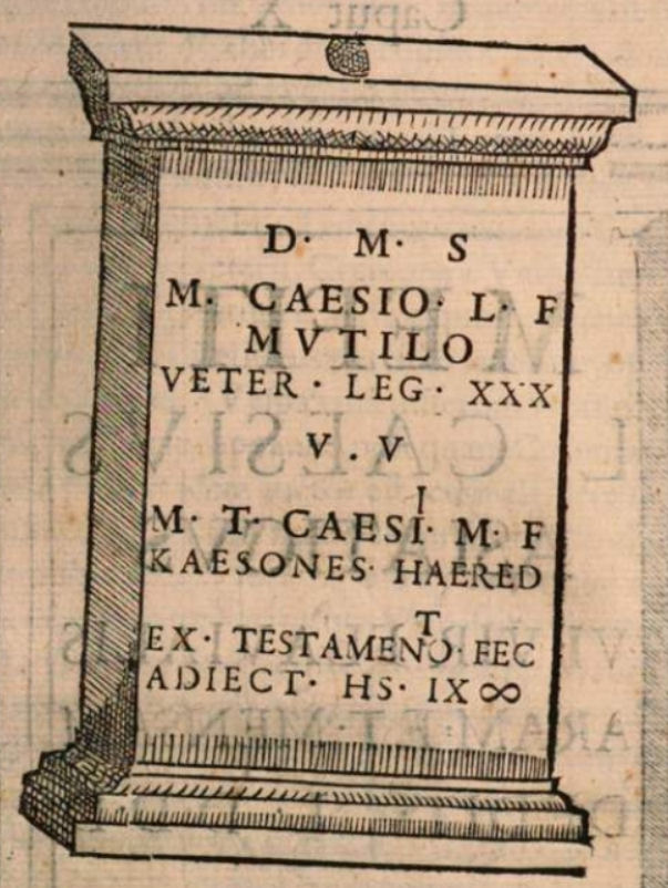 Grabstein des Veteranen der Legio XXX Ulpia Victrix Marcus Caesius Mutilus aus Asciburgum / Asberg (Moers), 2. Jahrhundert n. Chr.